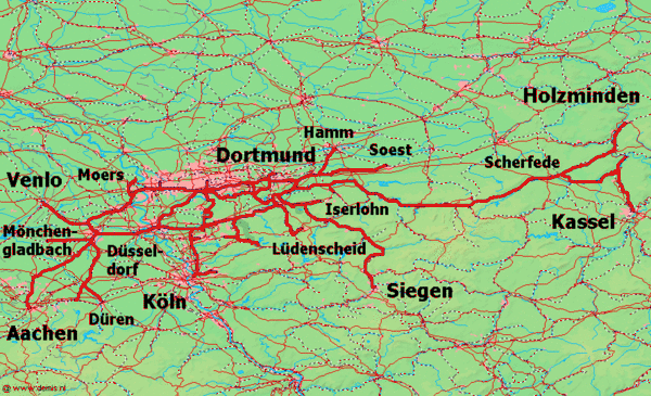 Karte der Bergisch-Märkischen Eisenbahn, Kartenquelle: [1]